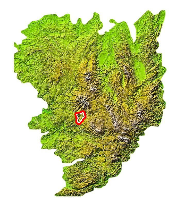 Le Carladès sur la carte du Massif central